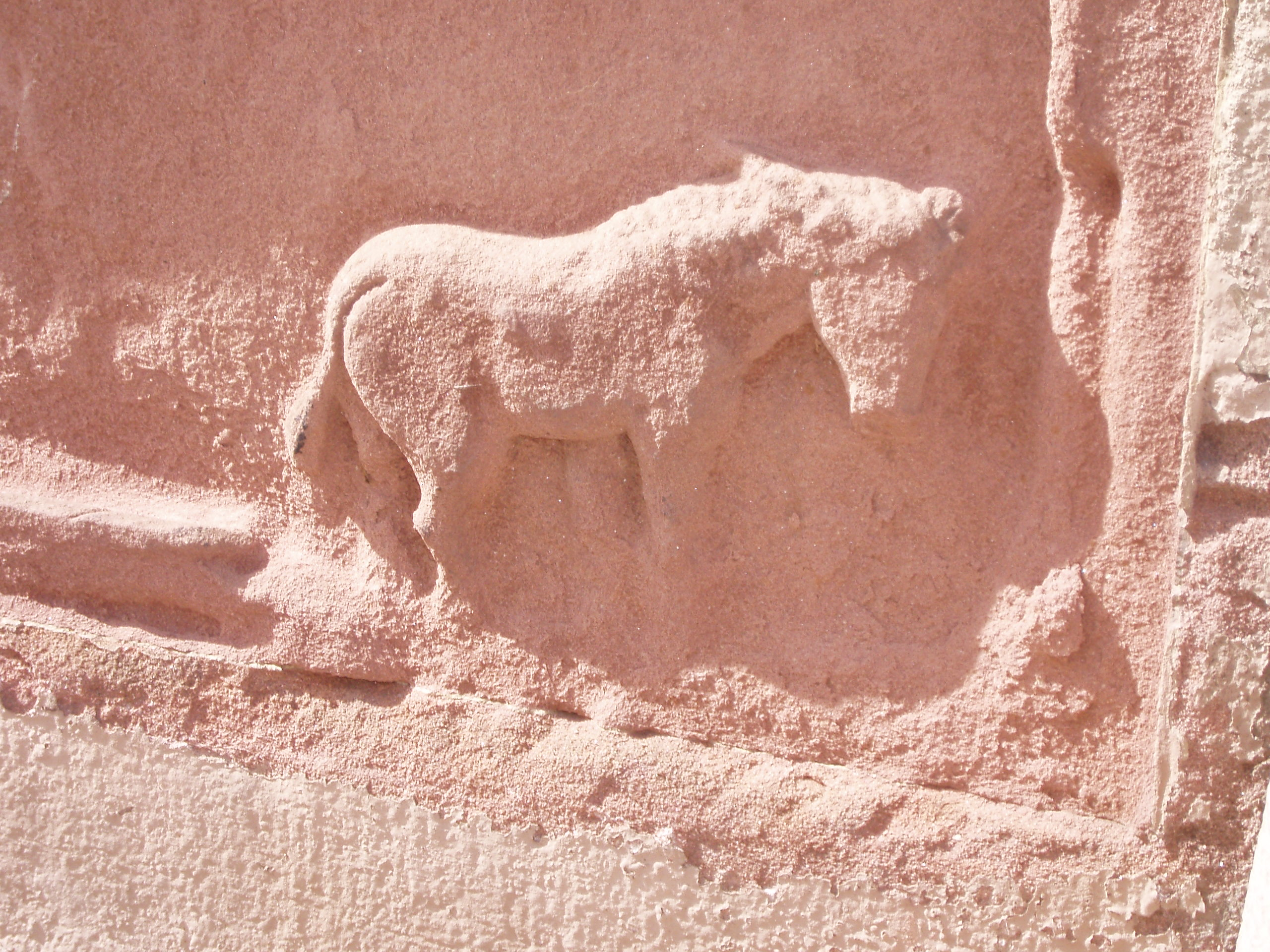 Detail des Eselreliefs am Haus Reichert